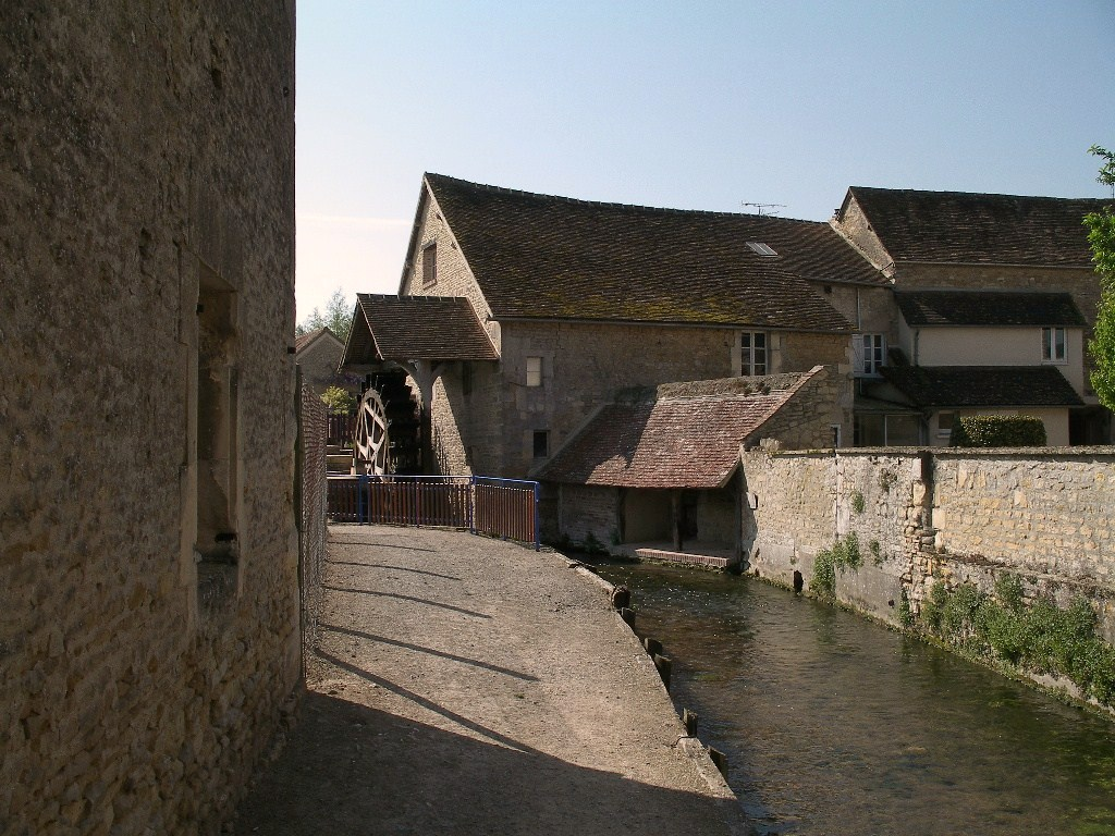 Le moulin de la Porte et lavoir sur la Muance à Argences (Calvados)